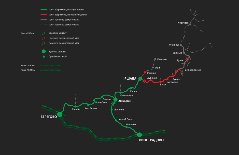 Схема Боржавської вузькоколійки